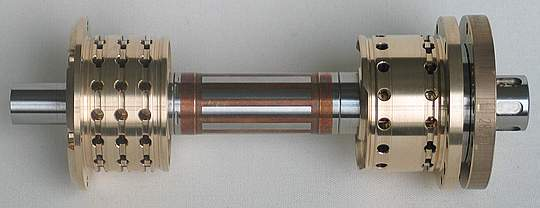 Luftlagerung einer Hochfrequenz-Spindel für das Leiterplattenbohren